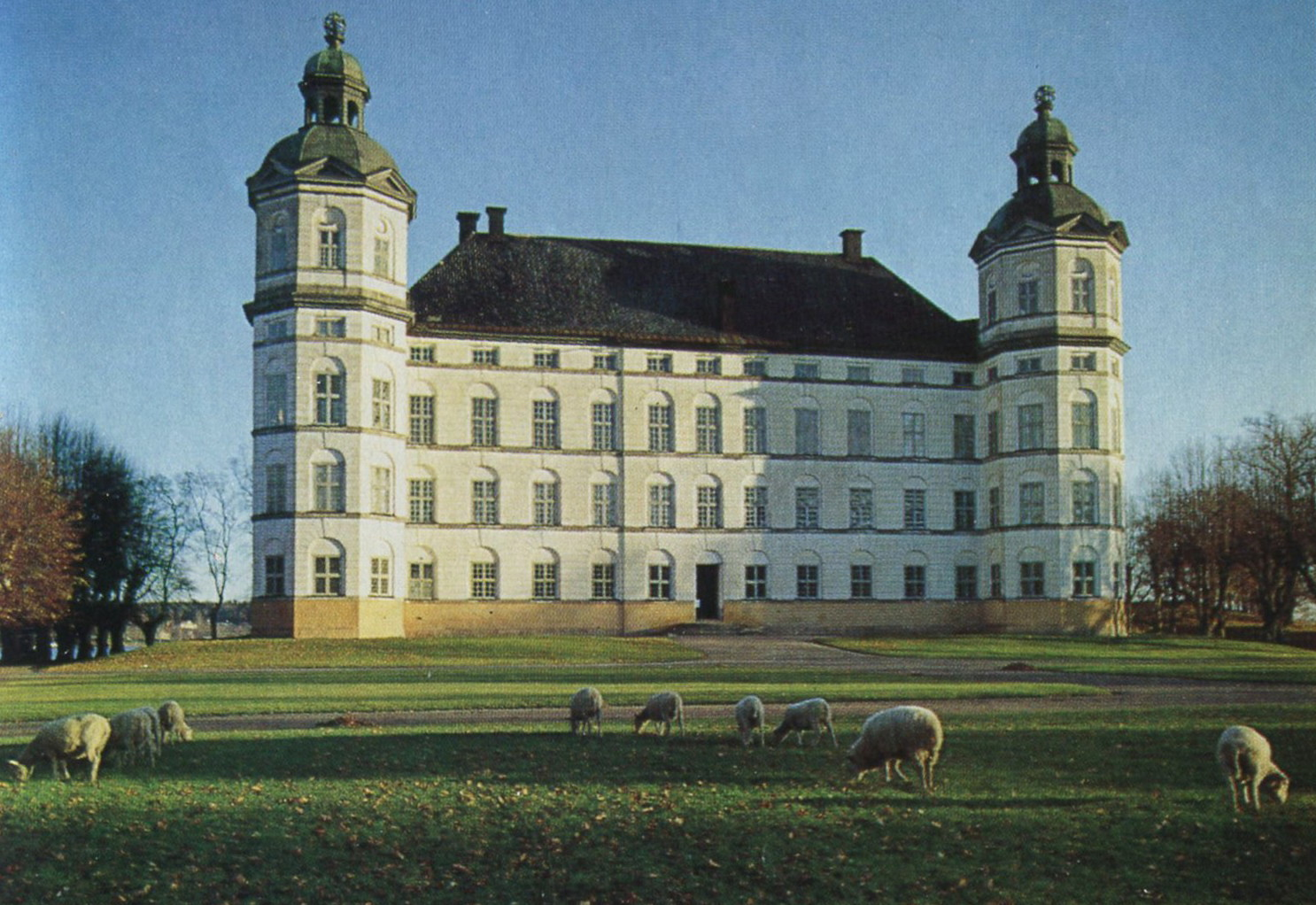 Skokloster 1967 i kvällsbelysning